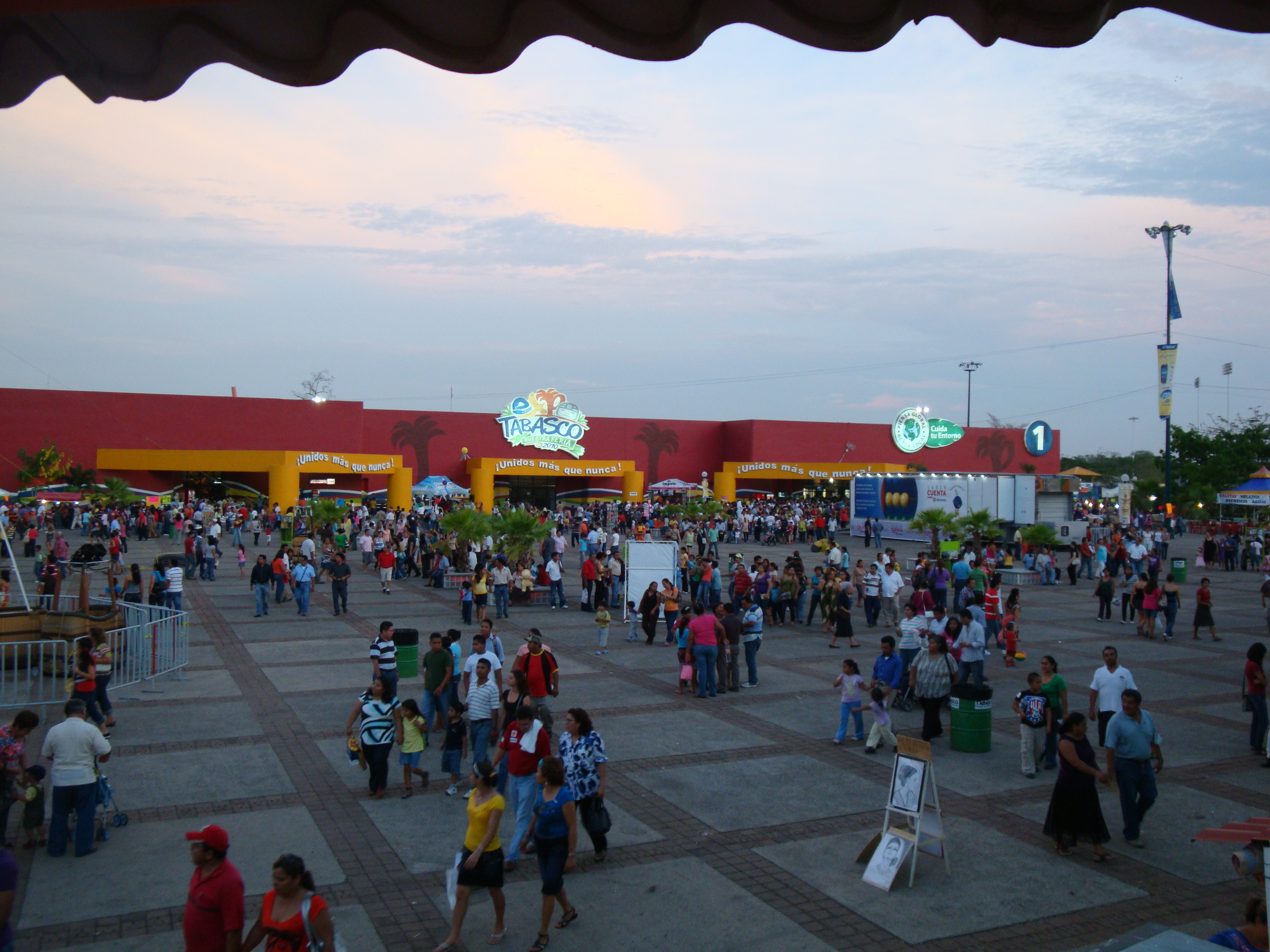 Expalanada principal del Parque Tabasco en donde se aprecia la nave 2, durante la Feria Tabasco